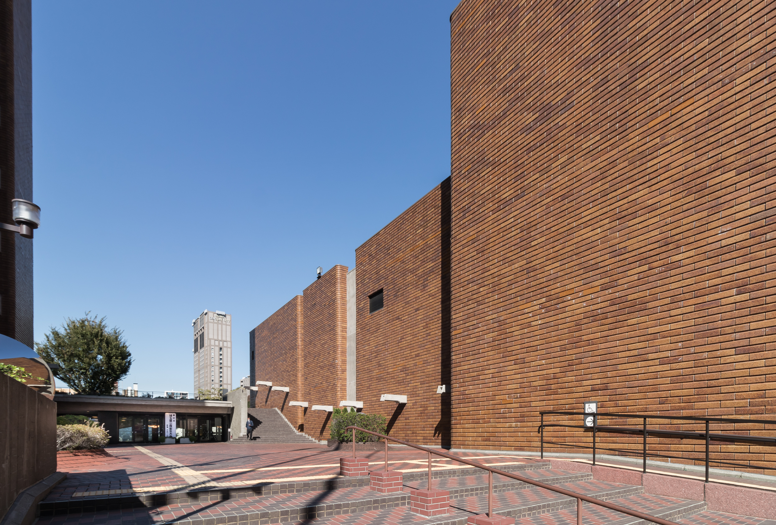 埼玉会館。前川國男設計（1966）